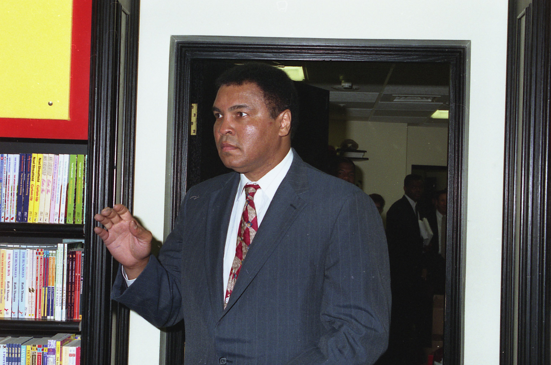 Muhammad Ali in 1993